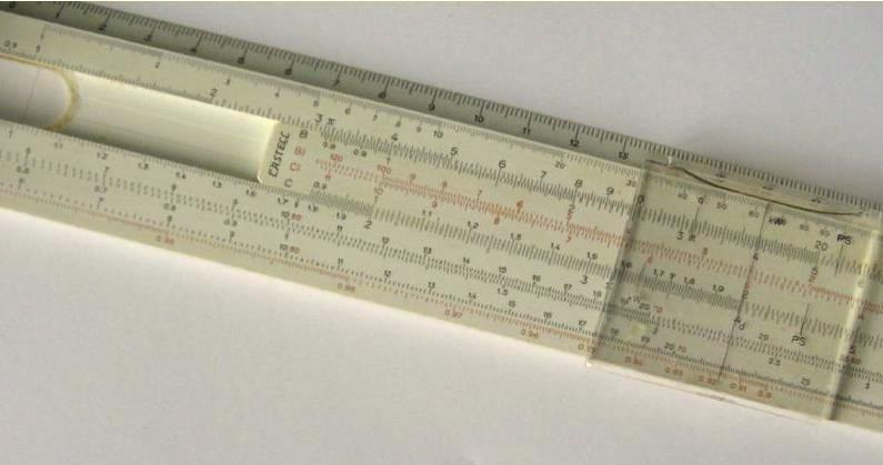 Slide Rule Quelle: eigene Aufnahme am 26. Augst 2005 Fotograf: Janez Novak, Ljubljana, Slovenija